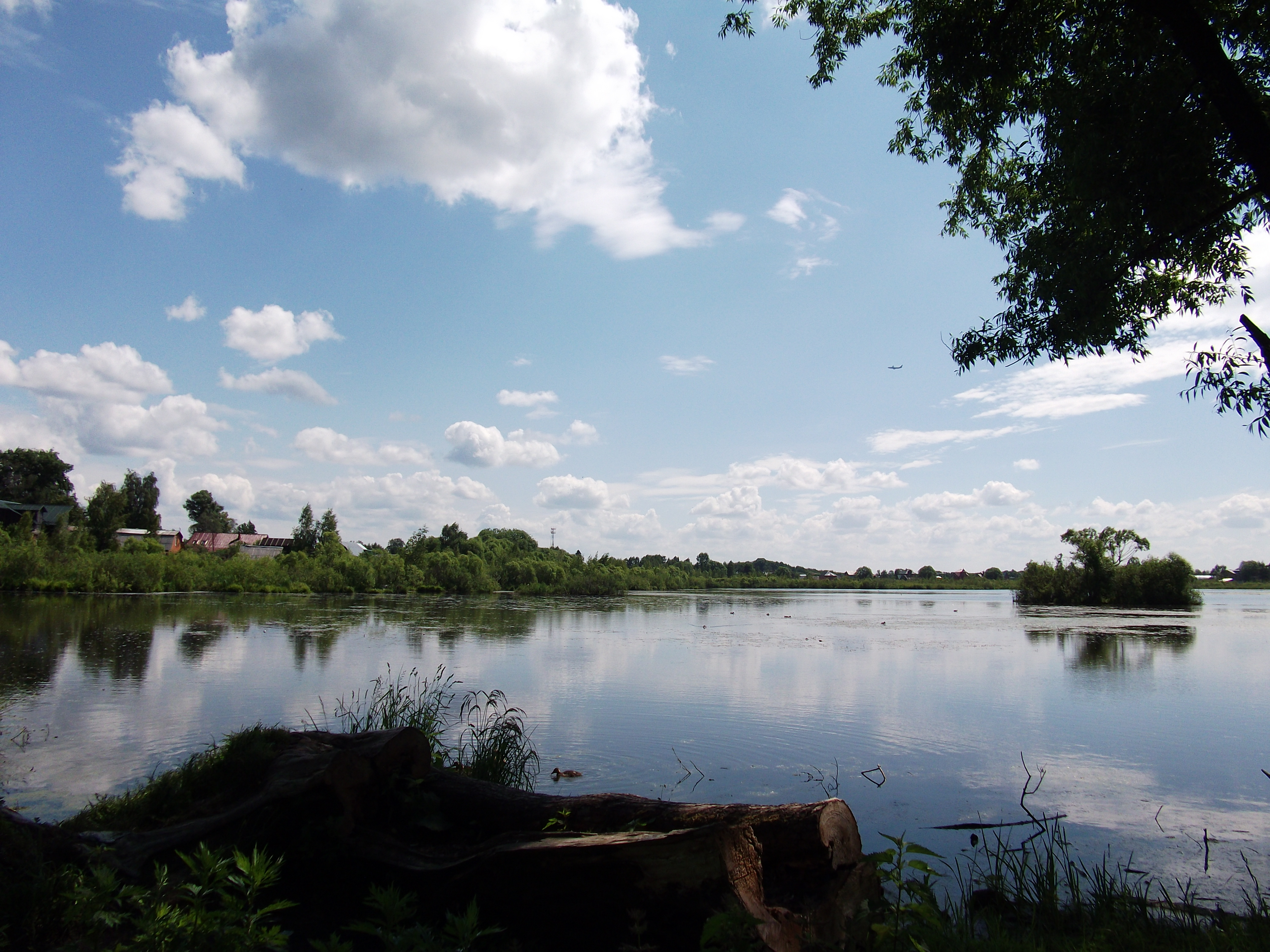 Киово озеро